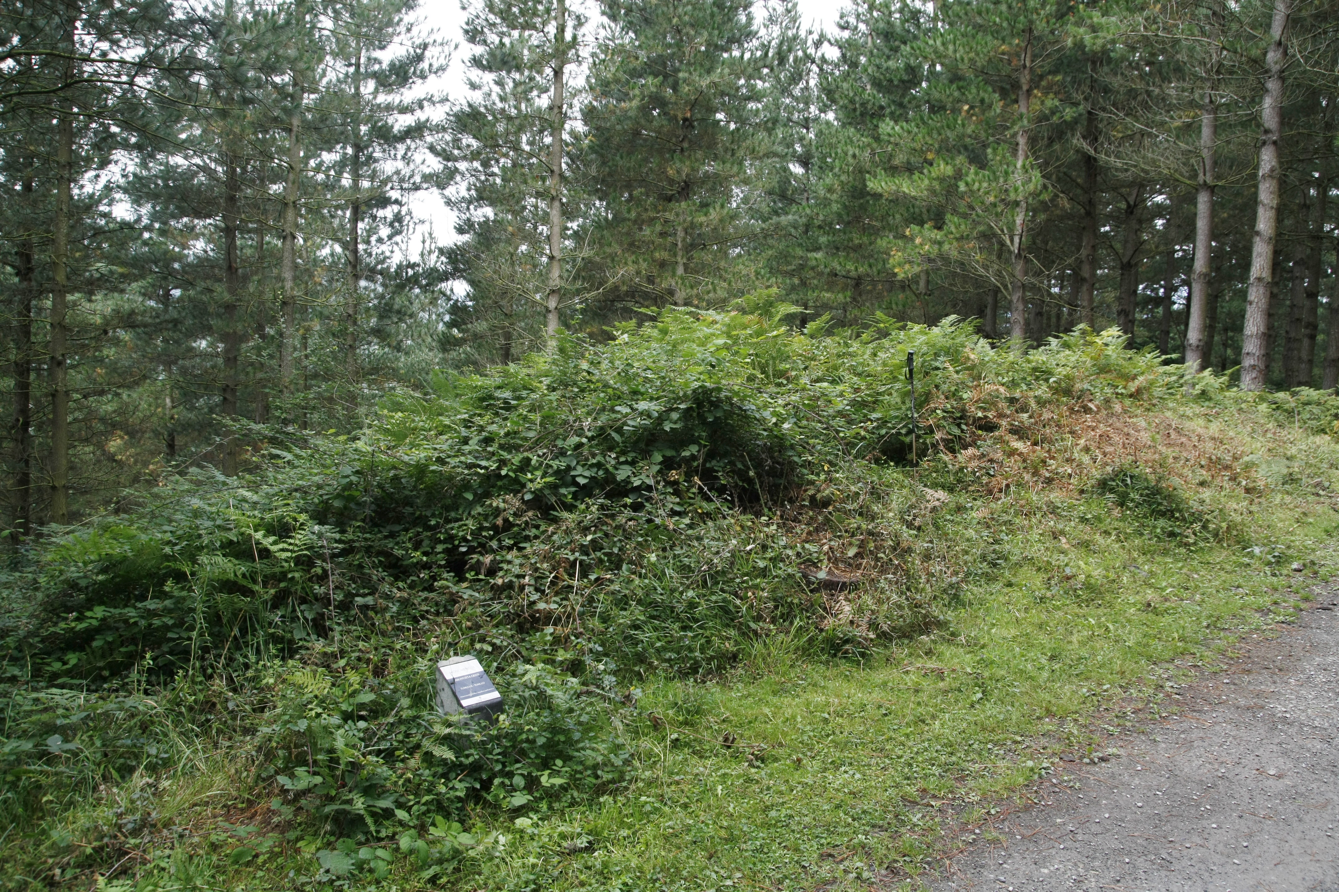 Asuntzeta Mendebalde tumulua